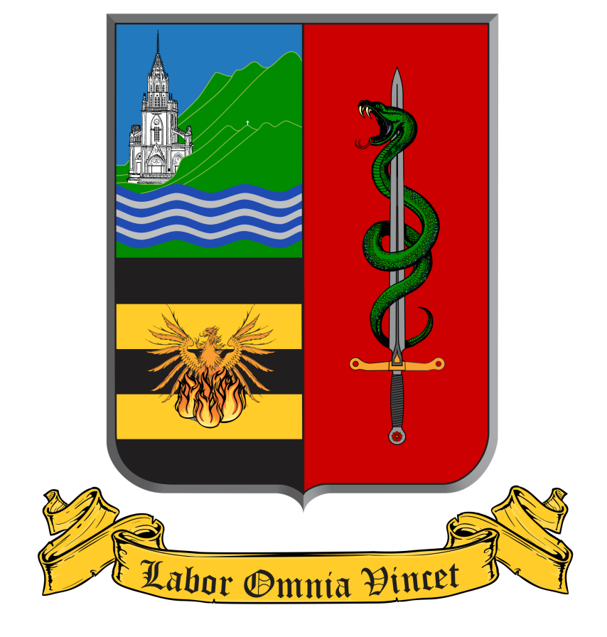 Cuadrante superior izquierdo: En la primera parte del escudo de San Pablo han quedado representados tres elementos propios del territorio: En primer lugar, en colores azul y plata, el Río Mayo, río que atraviesa el municipio, regando las zonas verdes y que provee de energía a parte del municipio; en segundo lugar, el Santuario de Nuestra Señora la Virgen de La Playa, lugar de peregrinación de propios y visitantes; y en tercer lugar, los cerros tutelares de San Pablo: Bateros, El Credo, El Baile y La Campana. Cuadrante inferior izquierdo: Este segmento del escudo está dedicado a la bandera del municipio, cuyas franjas negras representan los tres incendios sufridos por los antiguos habitantes. Las dos franjas amarillas representan la riqueza de la tierra. Y el ave Fénix que simboliza ese resurgir del pueblo sampableño desde las mismas cenizas. Partición derecha: Al lado derecho se puede observar una serpiente enredada en una espada. La espada simboliza aquella con la que solía pintarse a San Pablo, el apóstol de los gentiles. Con relación a la serpiente, la leyenda cuenta que, al observarlas, los antiguos moradores del territorio que hoy se conoce como San Pablo Nariño, exclamaban: ¡San Pablo bendito, San Pablo bendito, sálvanos de las culebras! Y esta oración, repetida tantas veces, fue la que determinó que este territorio llevara el nombre de aquel santo conocido como el apóstol de los gentiles. En la parte de abajo lleva un título con la inscripción “Labor Omnia Vinces”, que viene del latín: “El trabajo todo lo vence”.